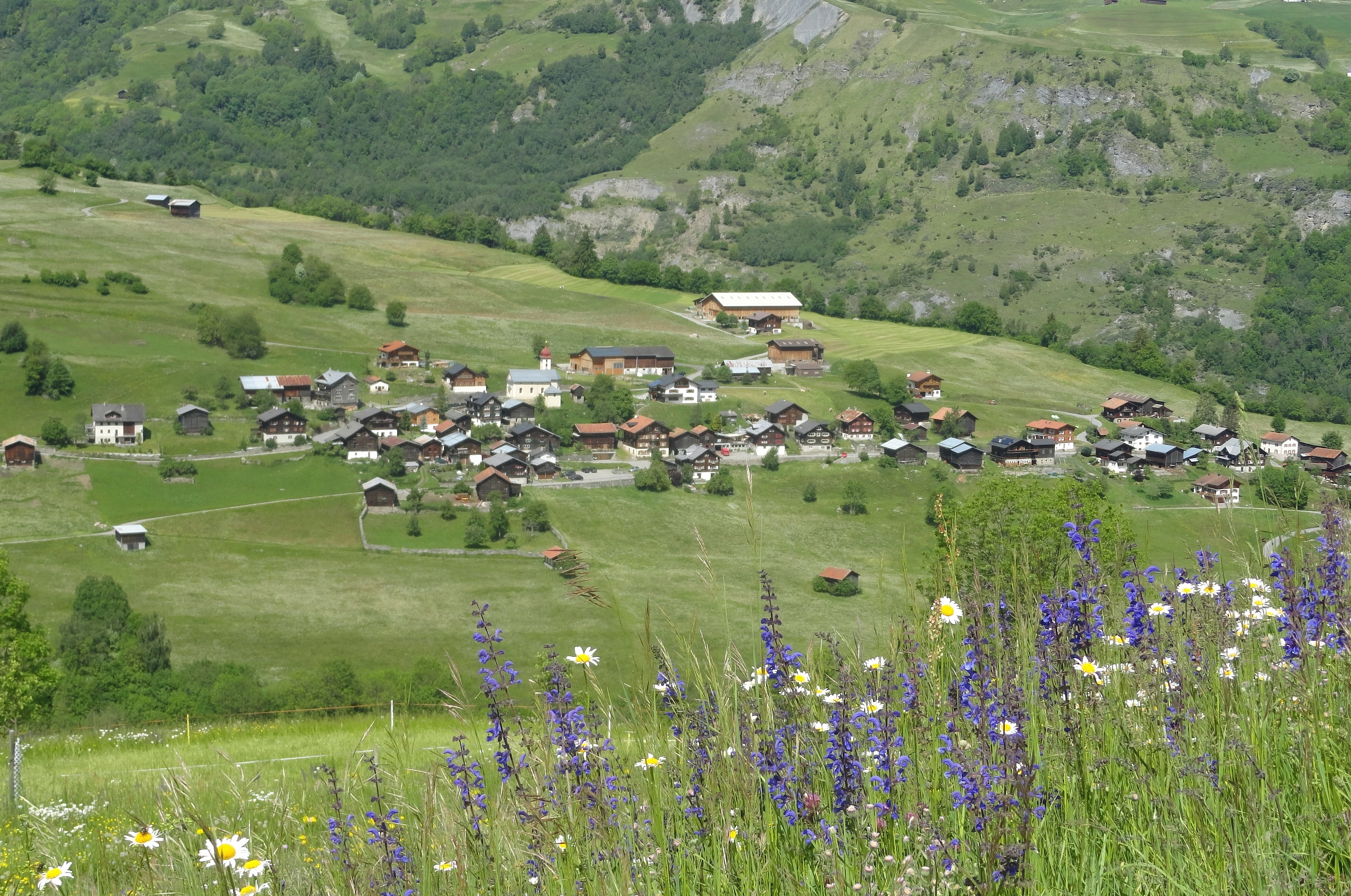 Surcasti